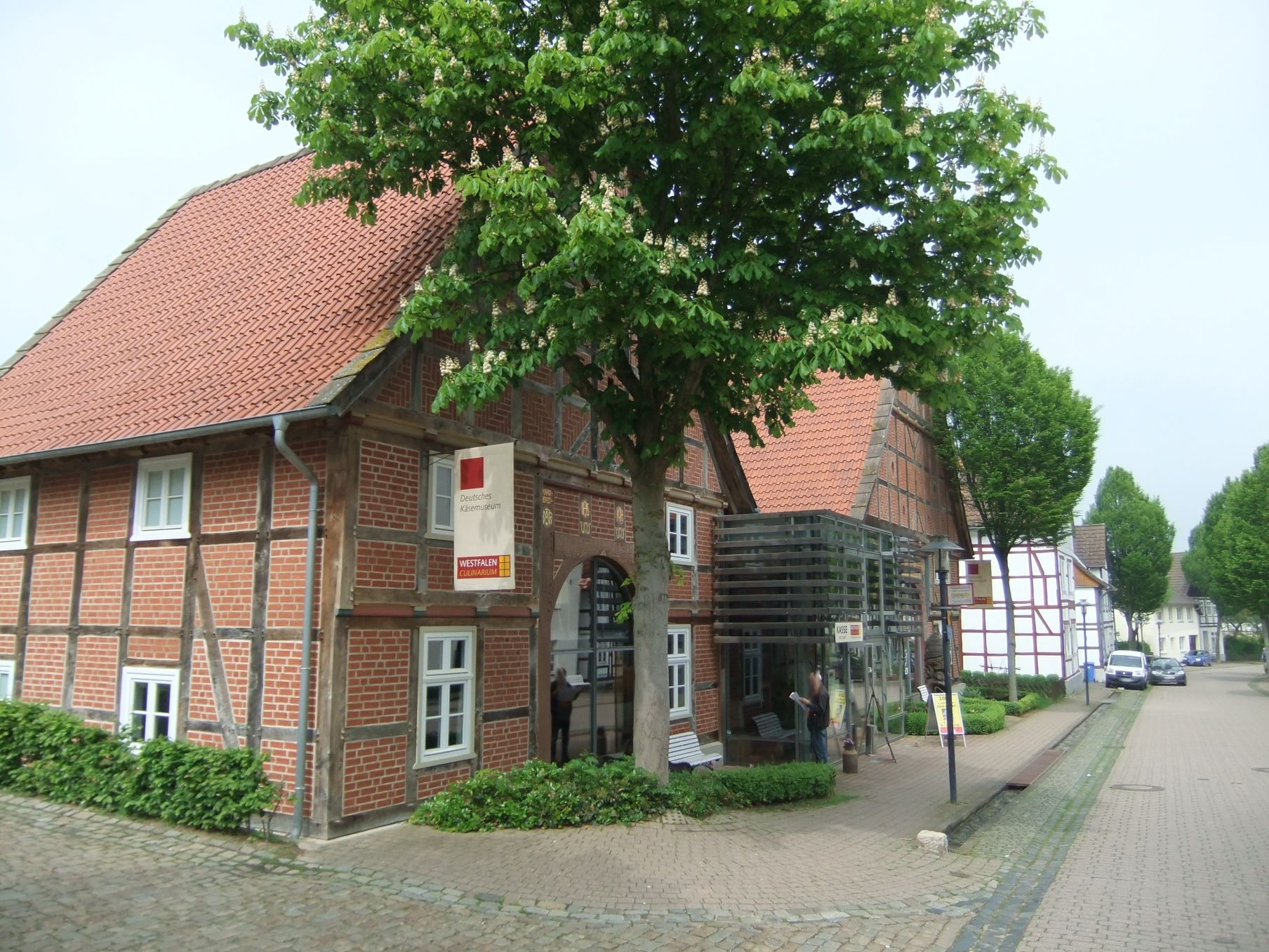 Käsemuseum Nieheim als Teil des Westfalen Culinarium. Auch Haupteingang des gesamten Museums und Gastronomie.